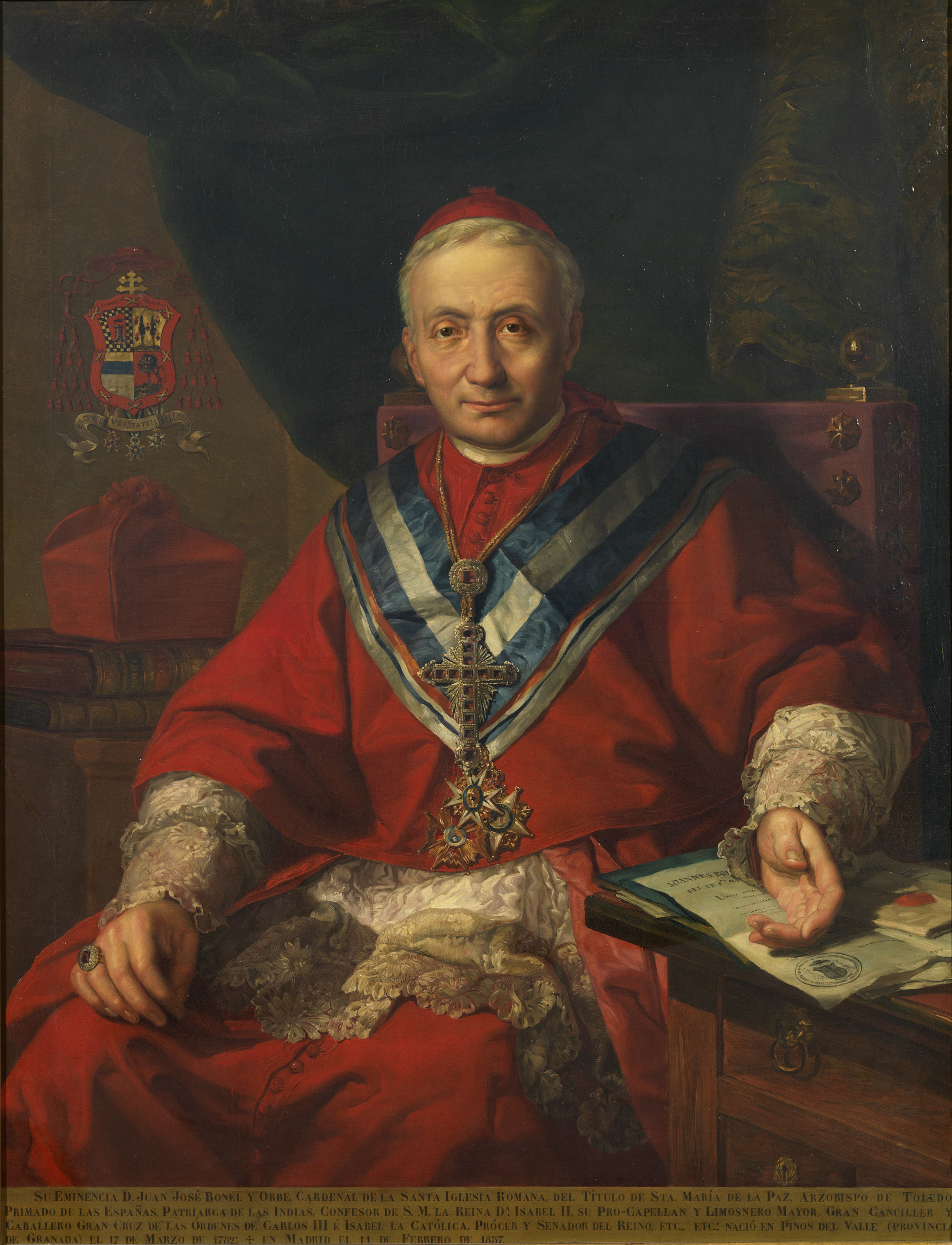 Retrato del cardenal Juan José Bonel y Orbe (1782-1857), que fue obispo de Malaga, Córdoba, arzobispo de Toledo y patriarca de las Indias Occidentales.